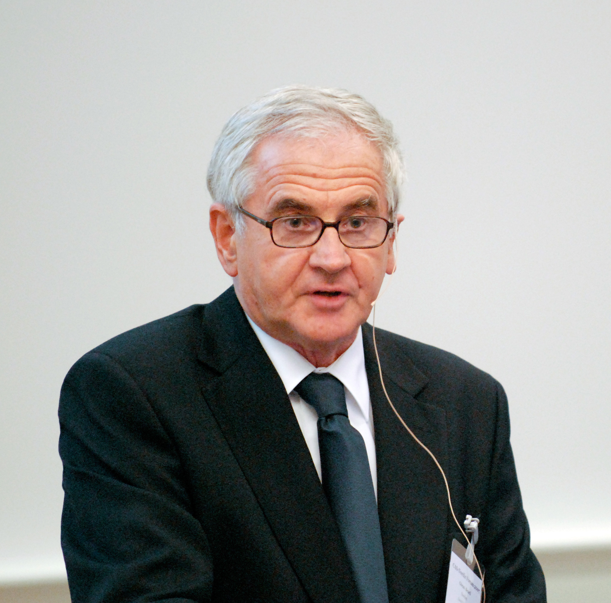 Göran Bexell, rektor för Lunds universitettinvigningstalar vid CAS-Nordic 2007 i Lund 2007-09-17